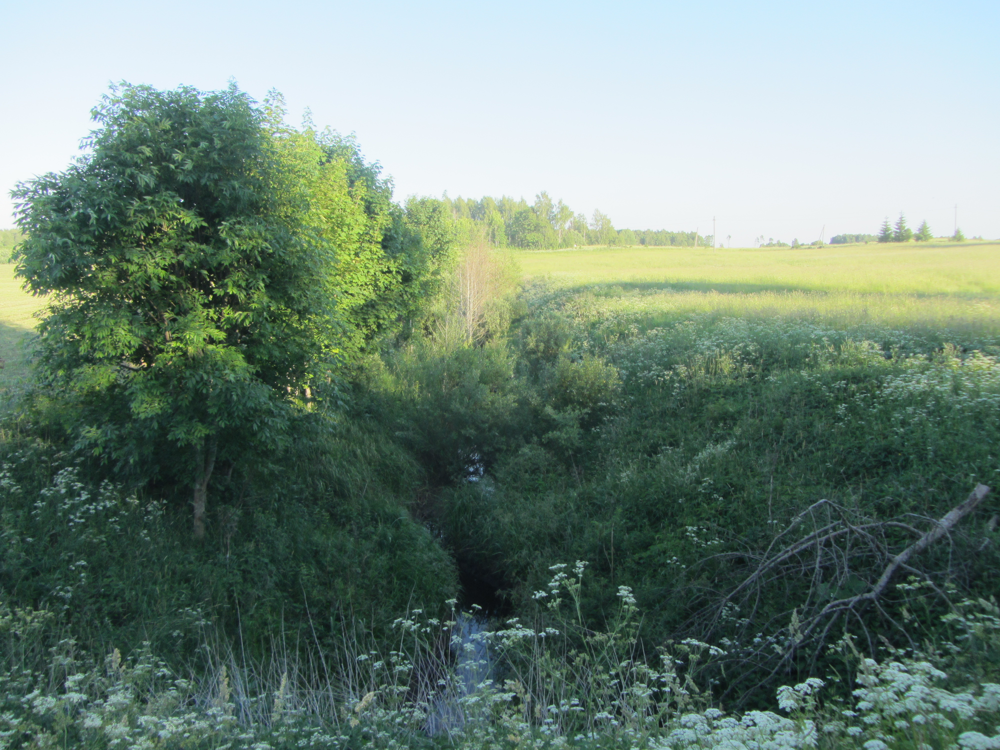 Skiemonių sen., Lithuania